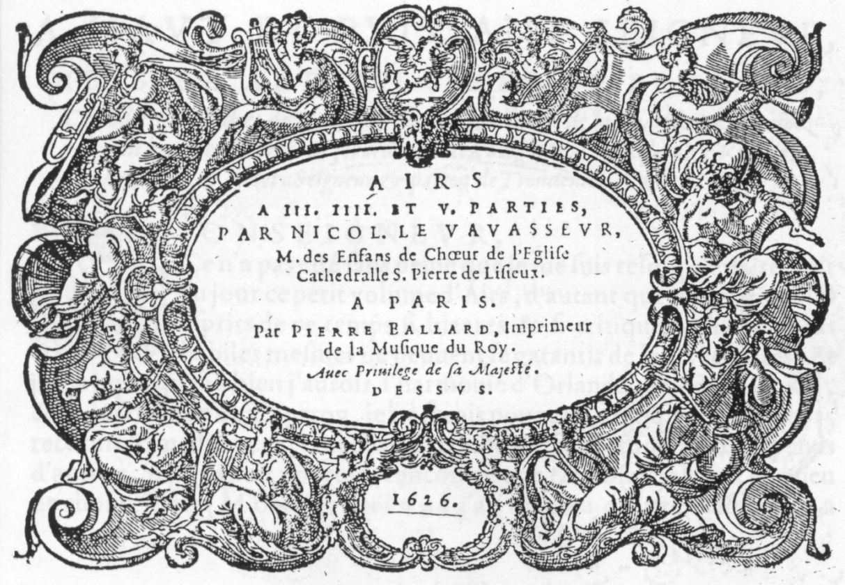 Title page of Nicolas Levavasseur's Airs (Paris : Pierre I Ballard, 1626).